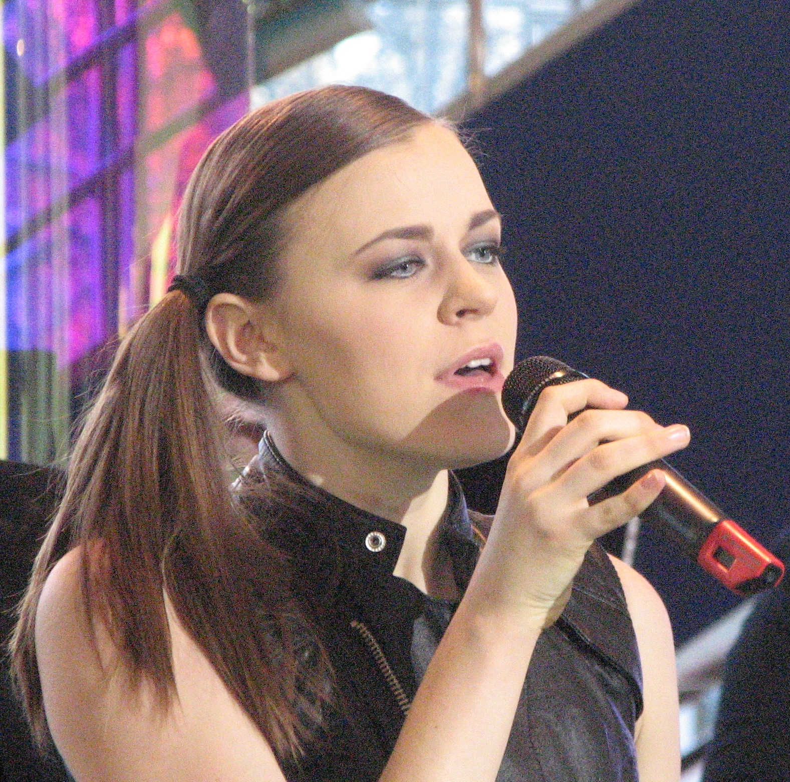 Rosanna Lints Ringvaate Eesti Laulu salvestusel POP Maniacs'i koosseisus